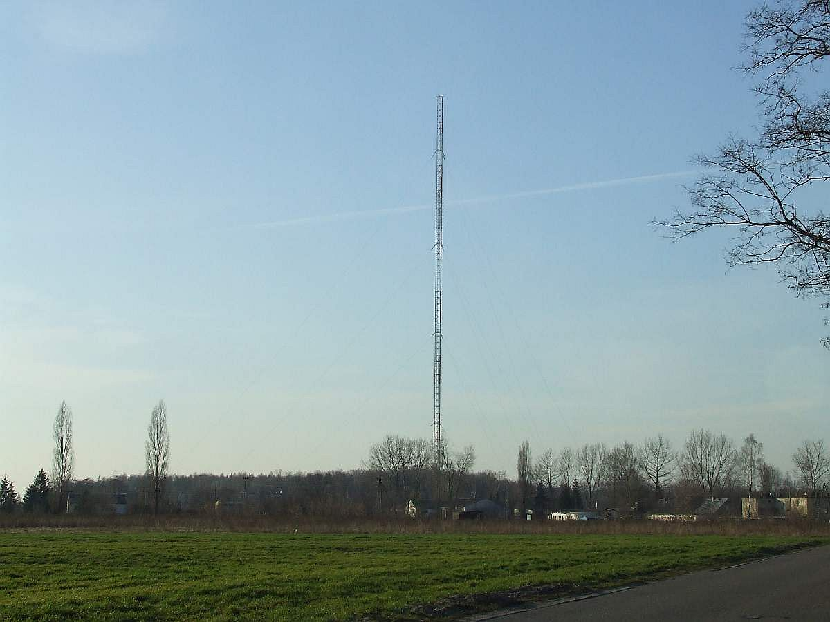 Radiostacja "Raszyn" w Łazach, widok od strony Antoninowa